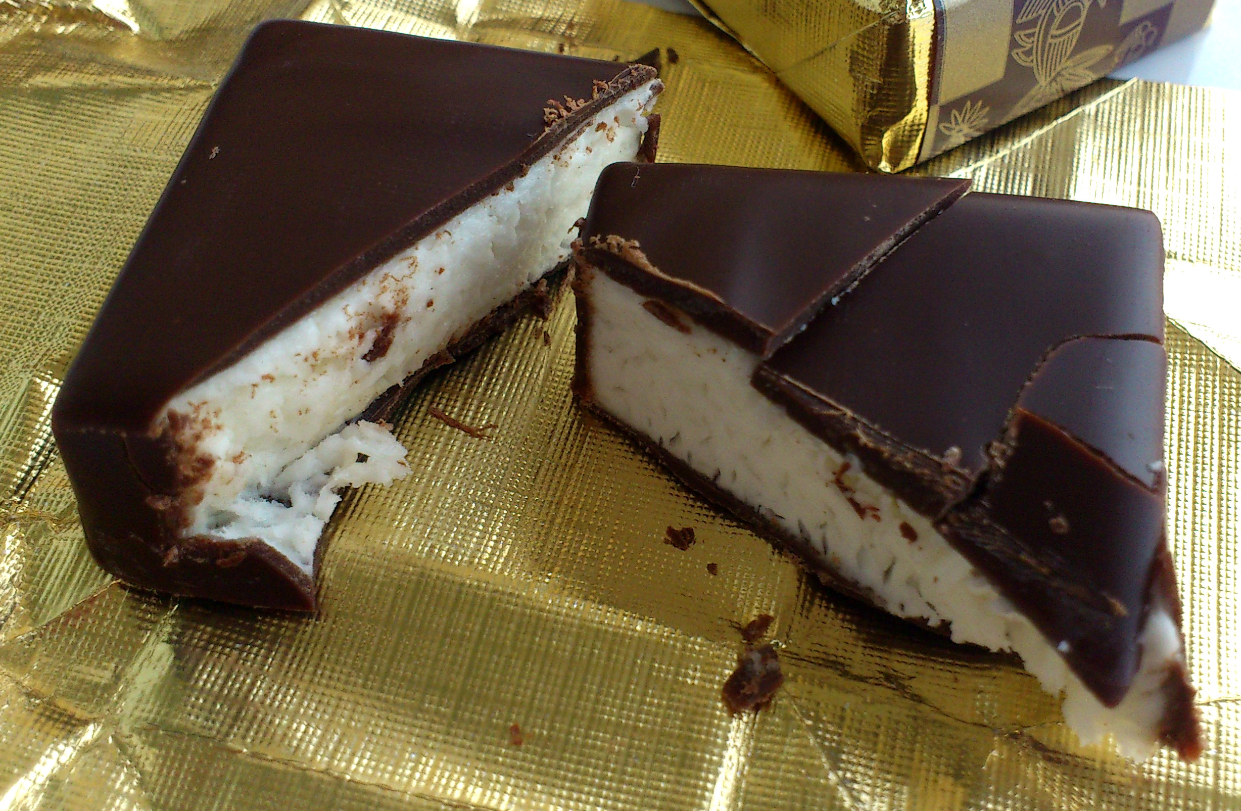 Птичье молоко фабрики РотФронт, Москва